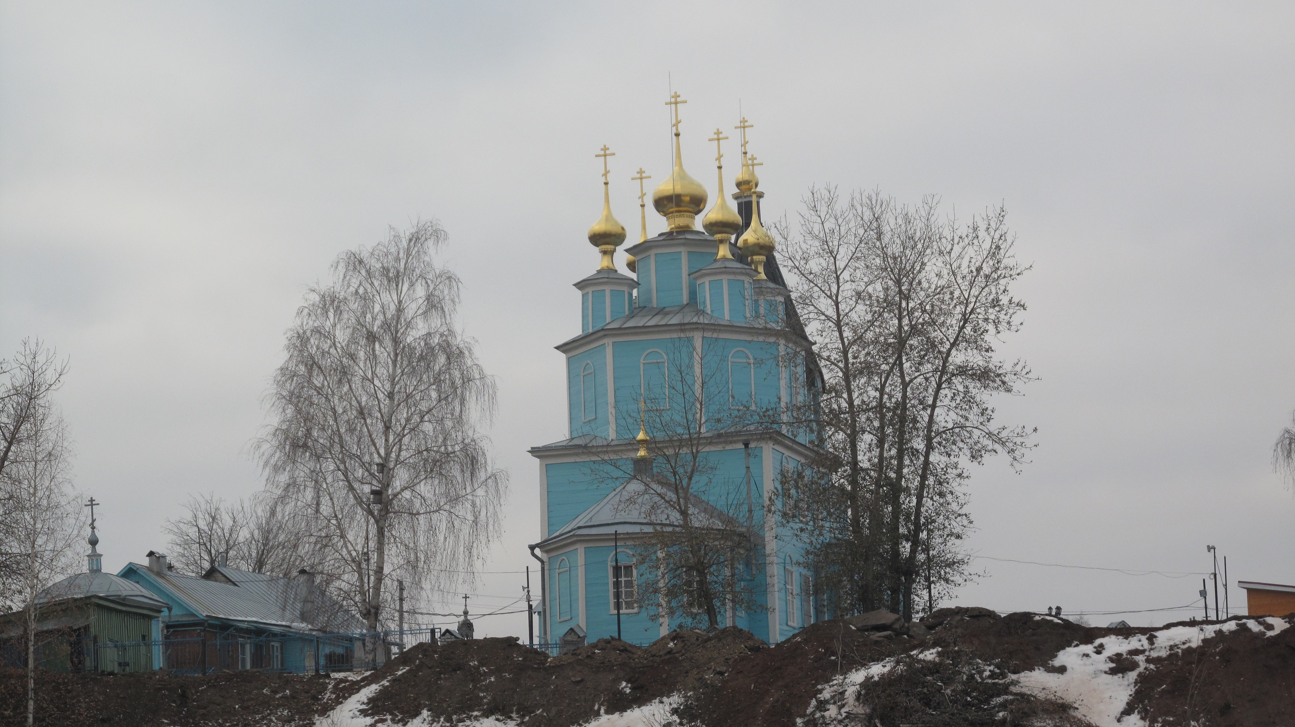 Церковь Казанской Иконы Божией Матери (Нижегородская область, Кстово, село Великий Враг)